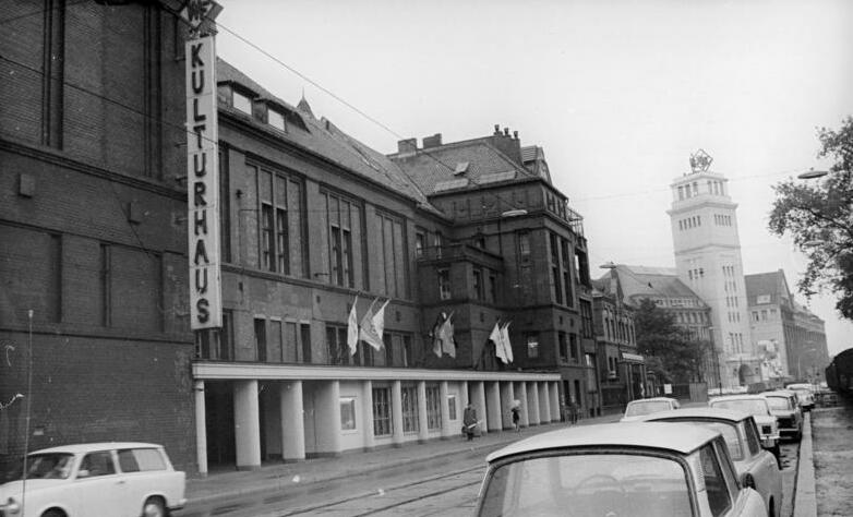 Berlin, Werk für Fernsehelektronik, Kulturhaus ADN-ZB Kutscher 20.10.75-Berlin-Weltkongress: Eine der Tagungsstätten für die 9 Kommissionen des Weltkongresses im Internationalen Jahr der Frau in Berlin ist vom21. Bis 23.Oktober 1975 das Kulturhaus des Werkes für Fernsehelektronik in Berlin